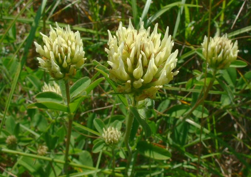 Trifolium spec., Bucey-lès-Gy, juin 2004